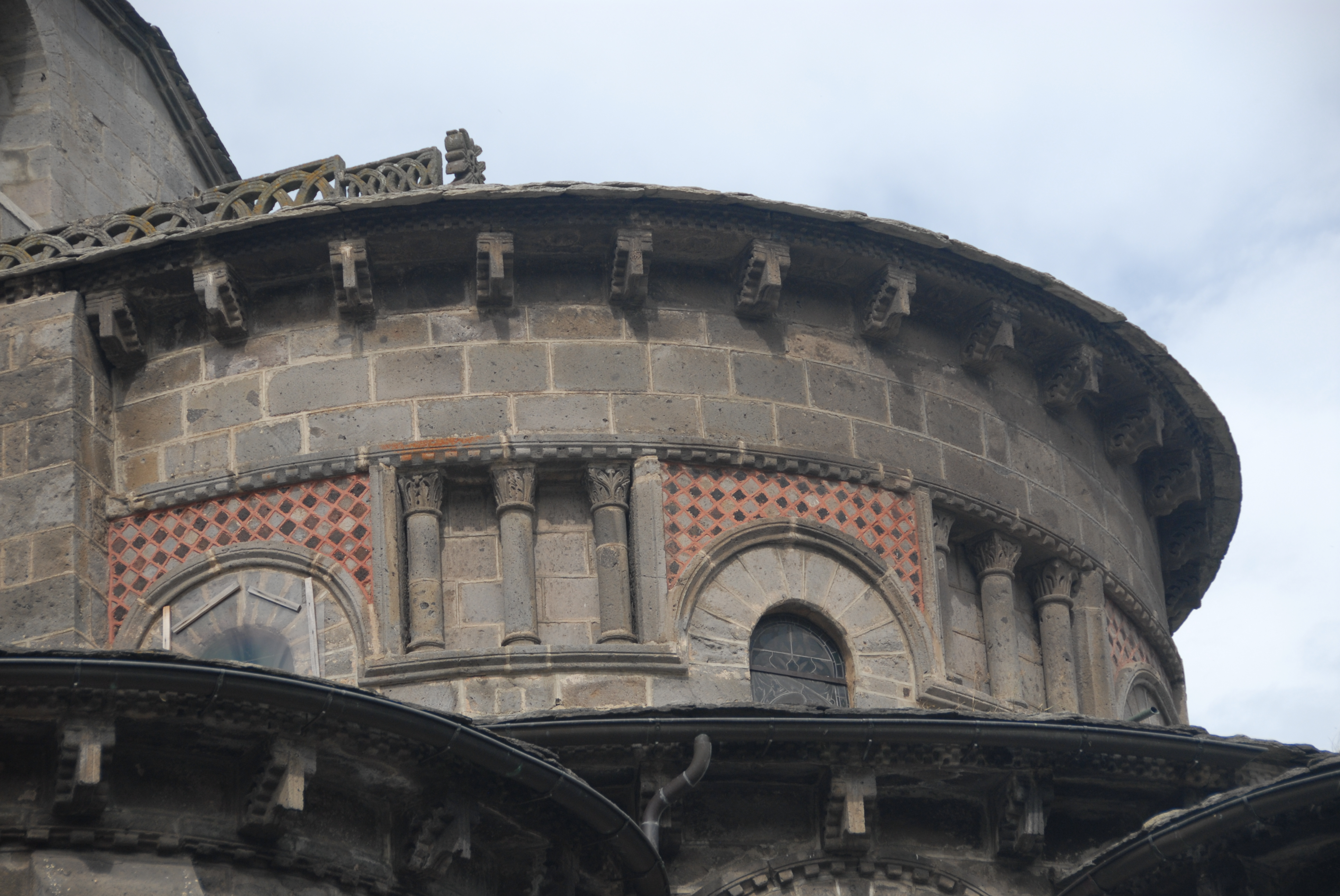 N.-D. d'Orcival, Chor über Umgang, von SO